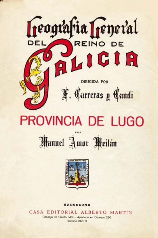 Geografía General del Reino de Galicia dirigida por F. Carreras y Candi. Provincia de Lugo por Manuel Amor Meilán.